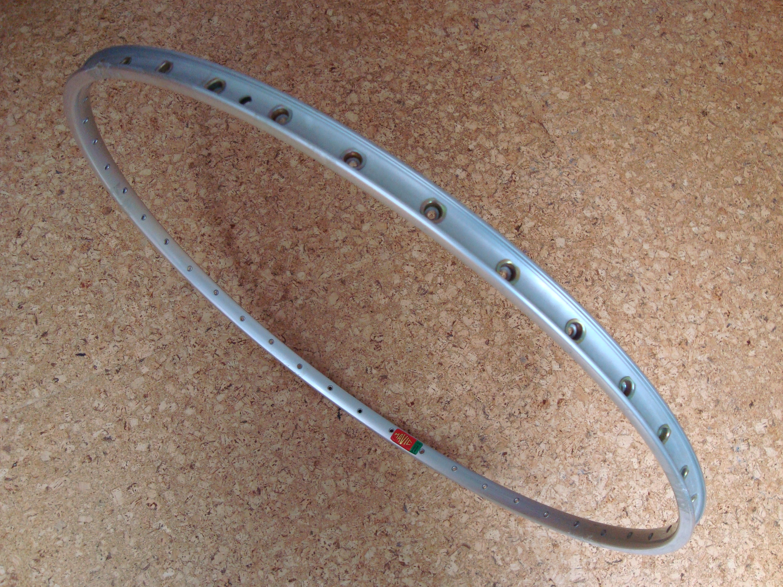 Felge für Fahrräder Typ Mavic Module 3Argent D 48Loch doppelt geöst